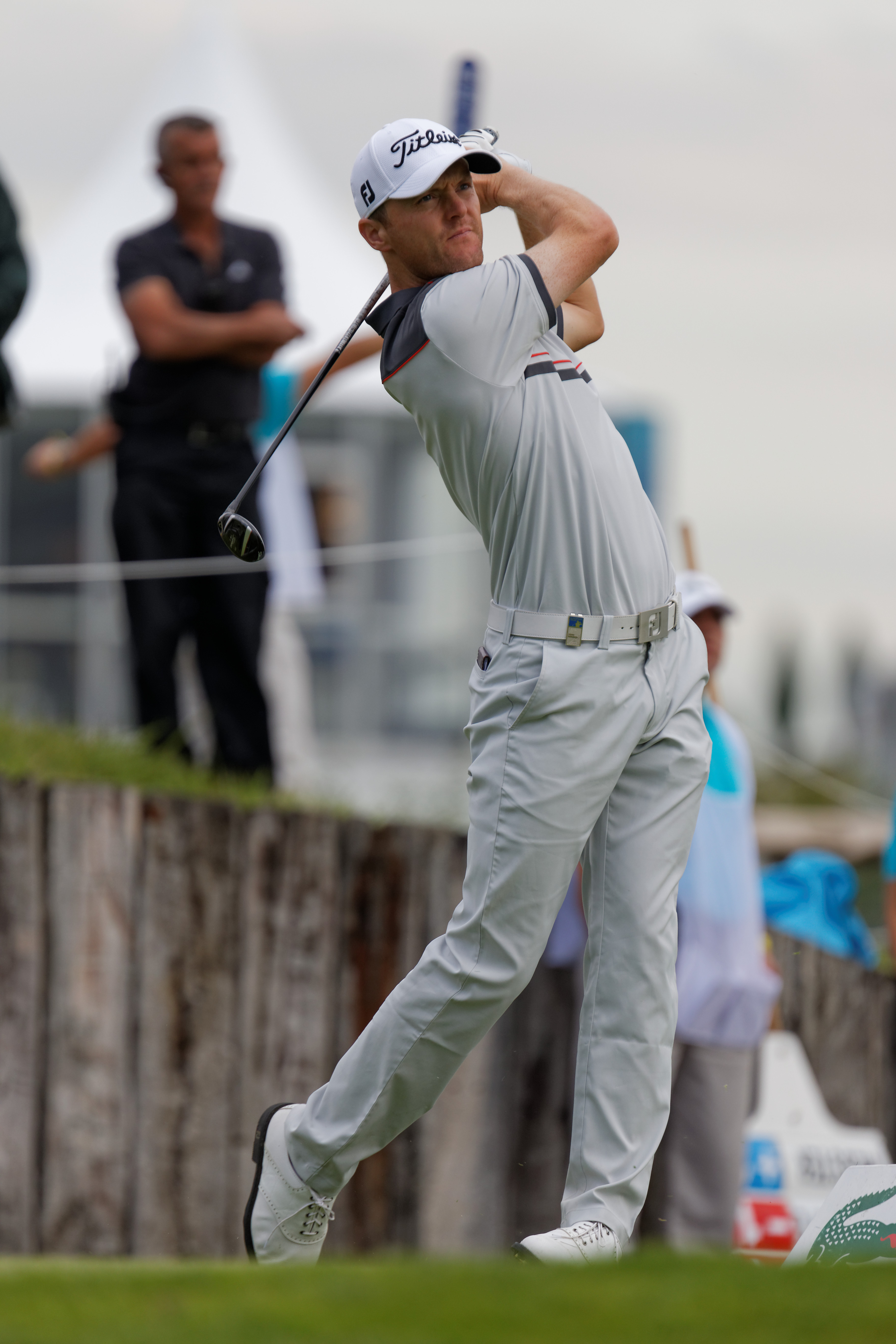 Michael Hoey lors du second tour de l'Open de France 2014 - Golf National - Saint-Quentin-en-Yvelines (78)